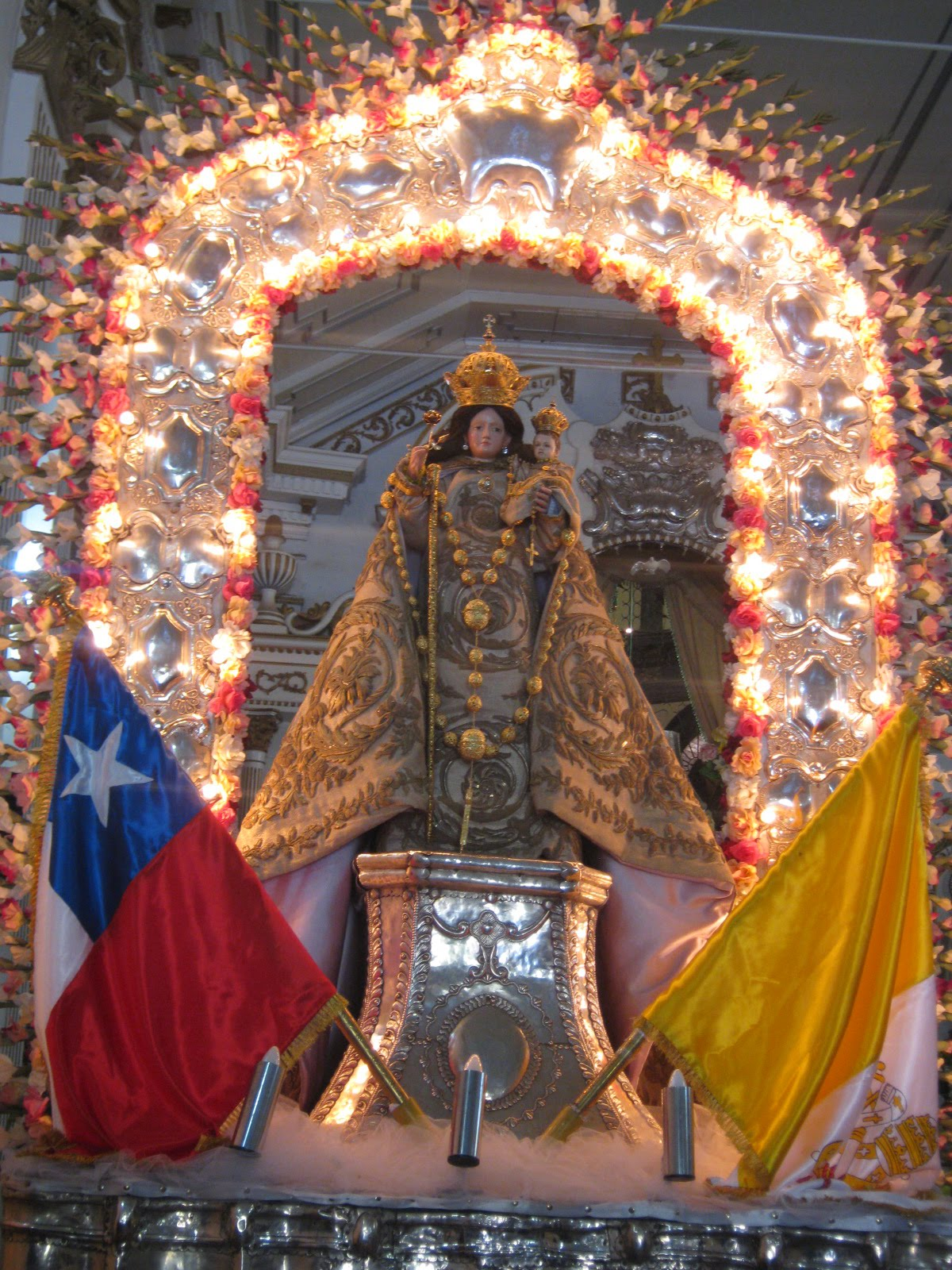 Fotografía virgen del rosario en Andacollo Chile